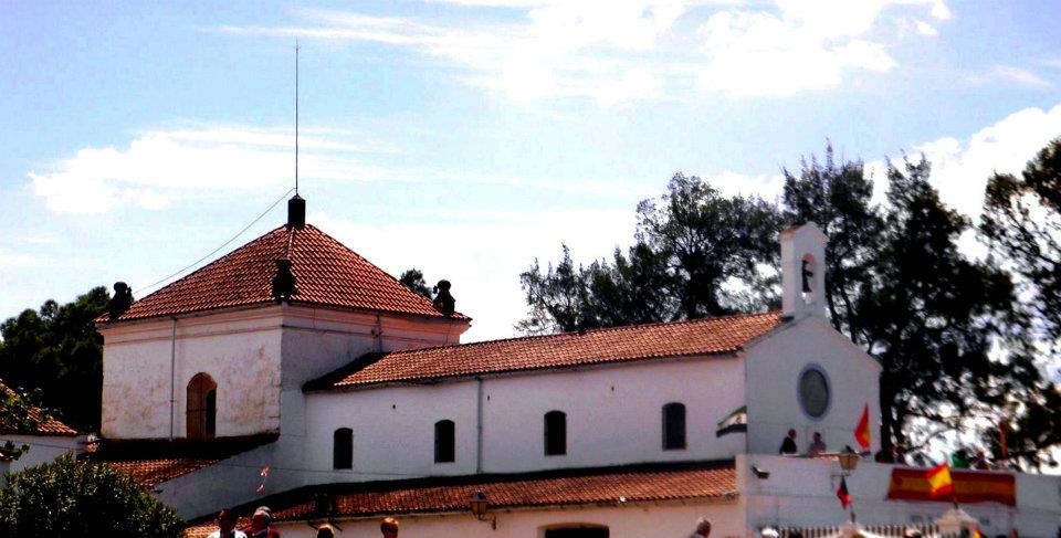 Vista de la ermita.